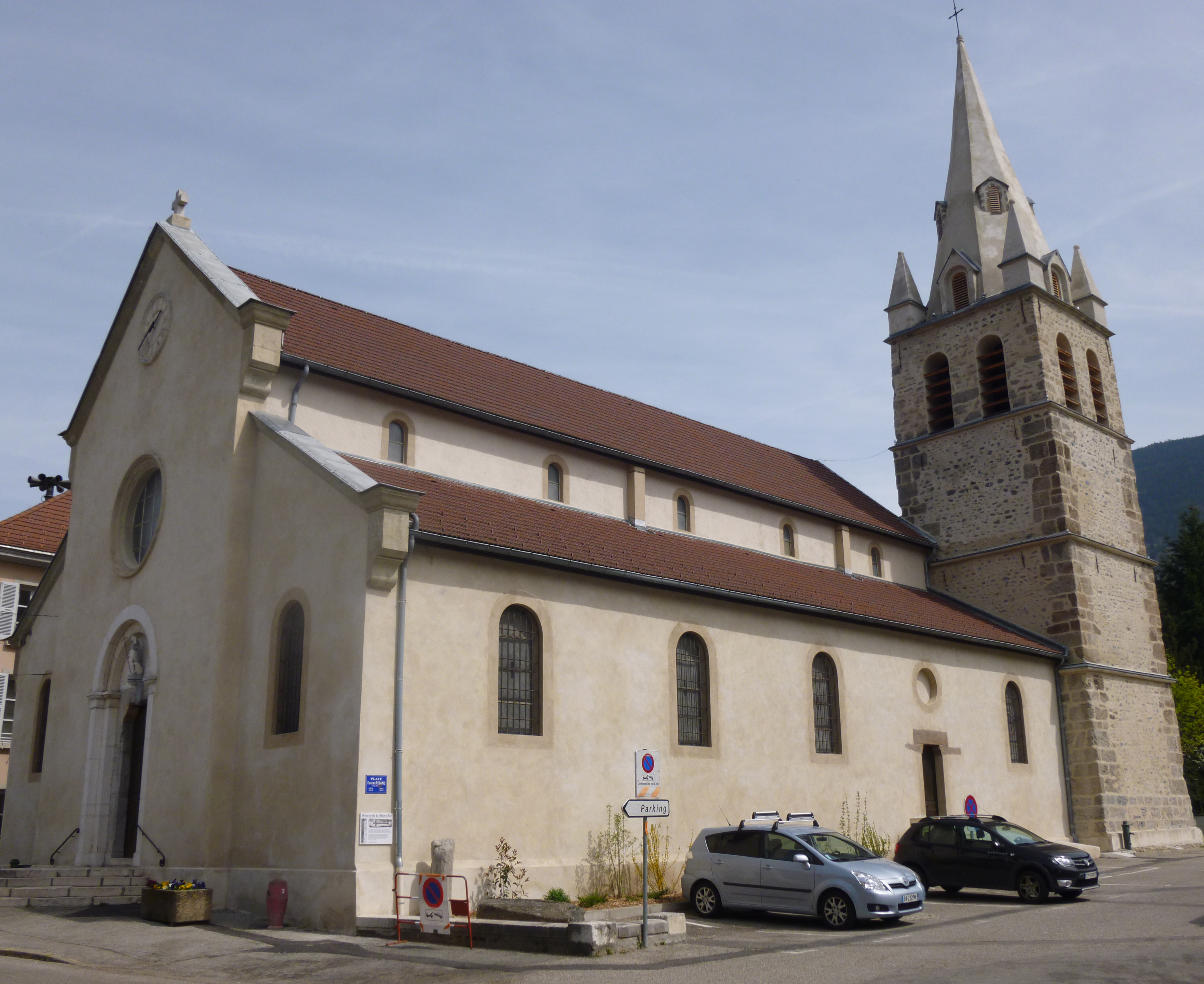 L'église de Vaulnaveys le haut en avril 2014.